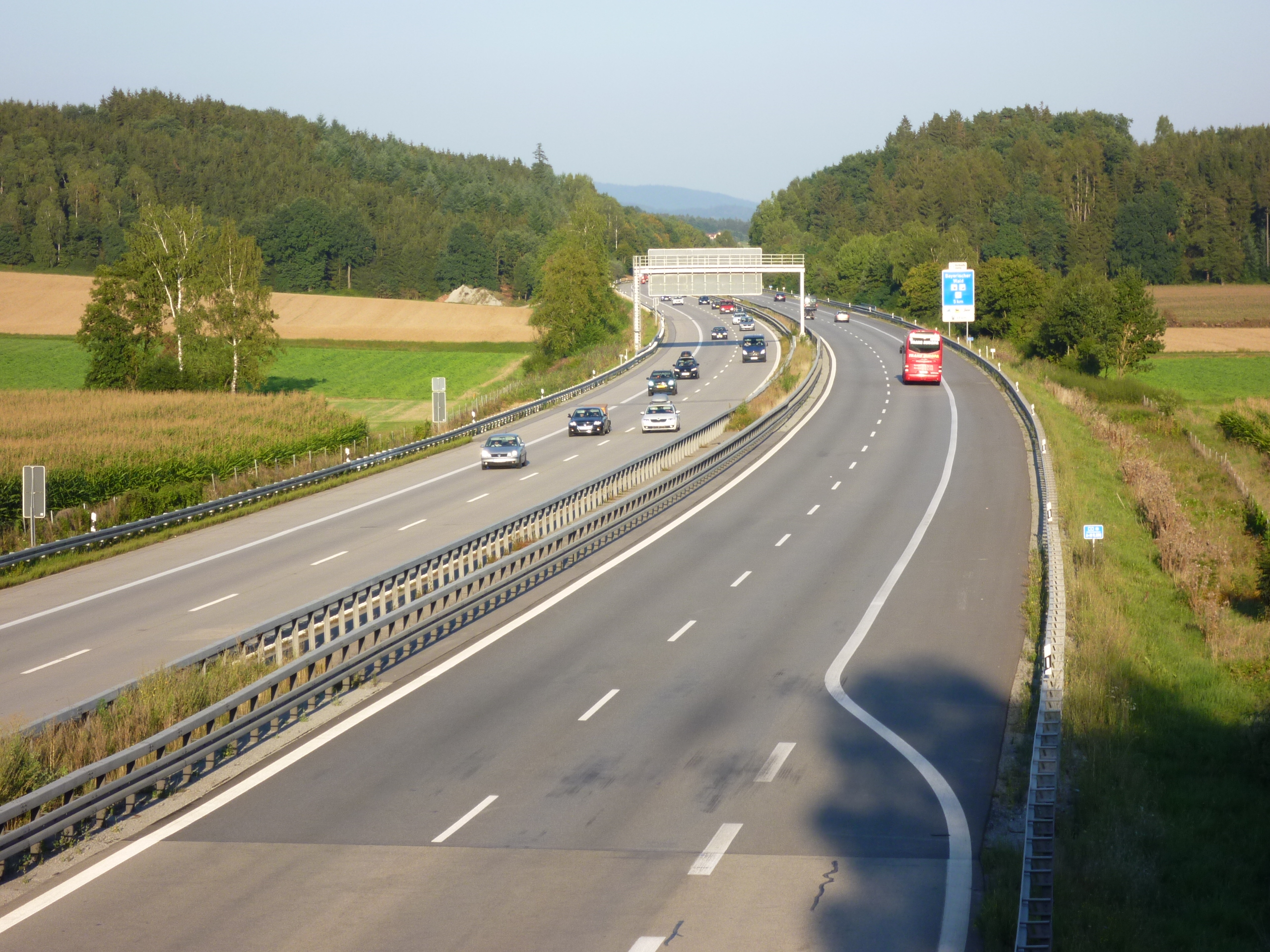 Die Autobahn A3 auf Höhe der Ausfahrt Straubing/B 20 in Fahrtrichtung Passau (Raststätte Bayerwald).